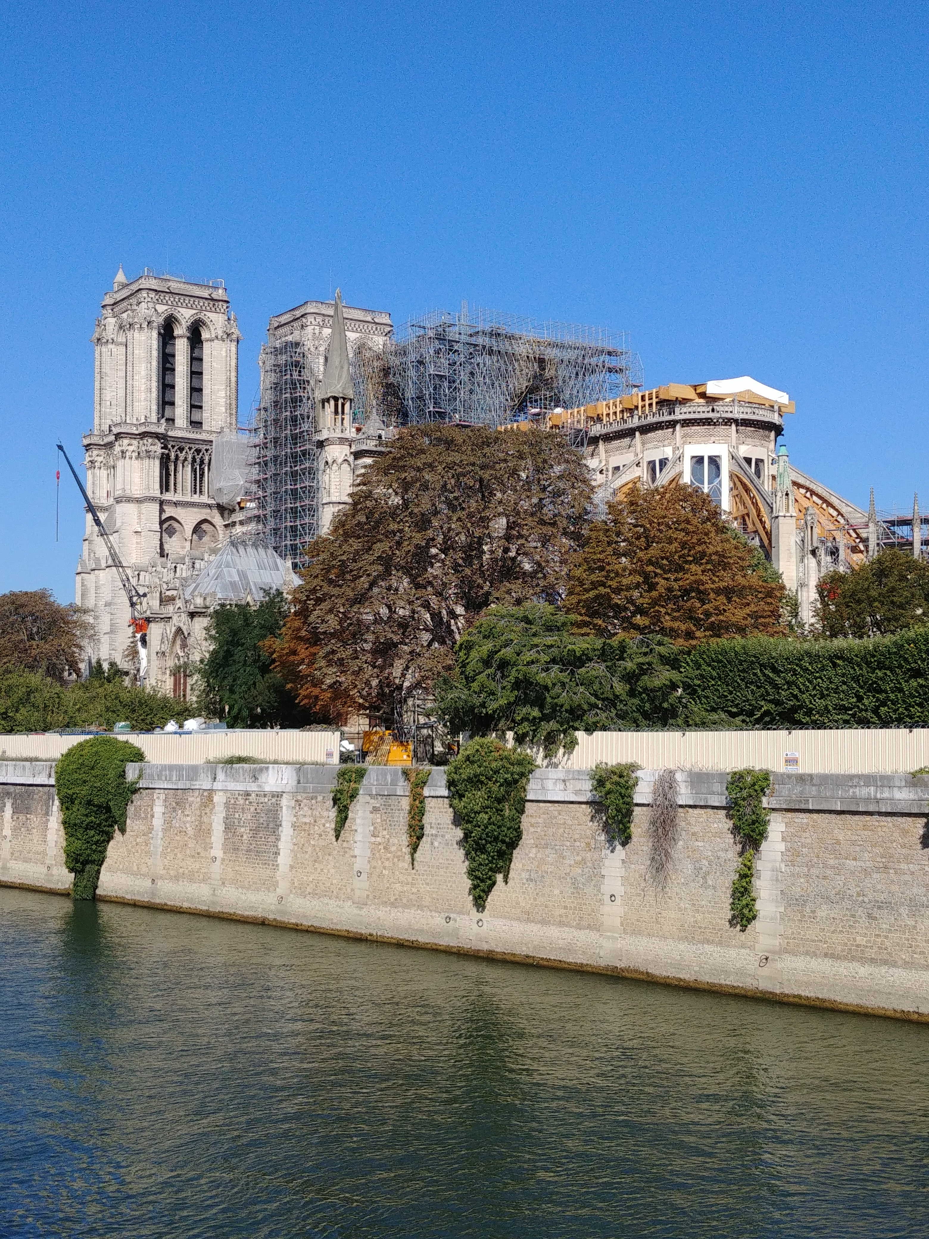 La cathédrale Notre-Dame en chantier en Septembre 2019.